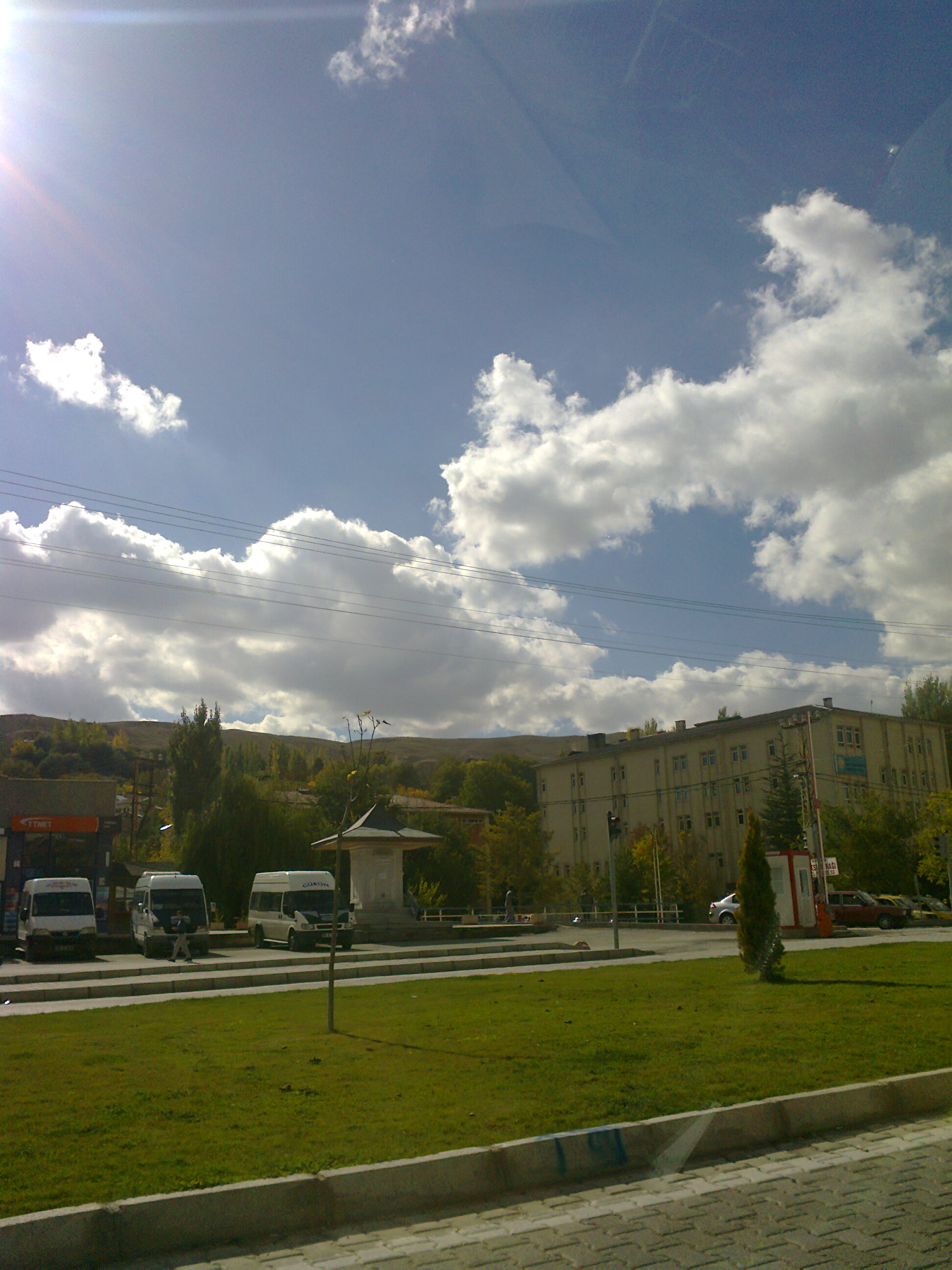 Gürün, Sivas, Türkiye